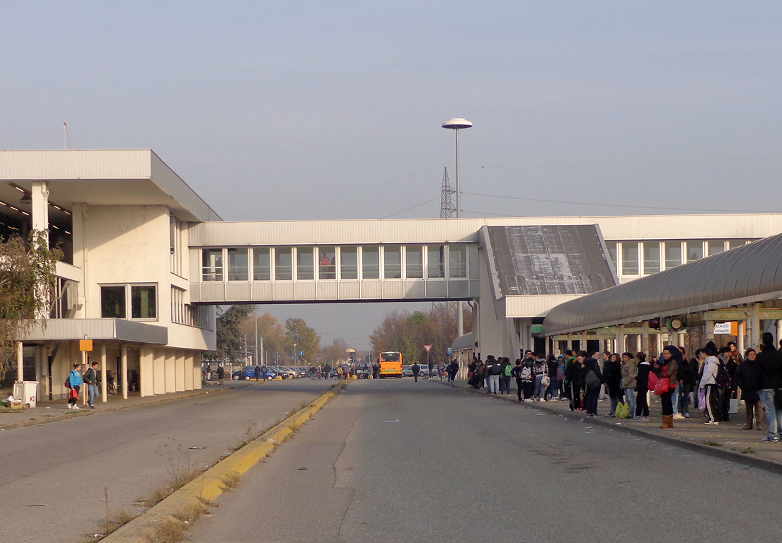 Stazione di Gessate della metropolitana di Milano, il capolinea degli autobus.